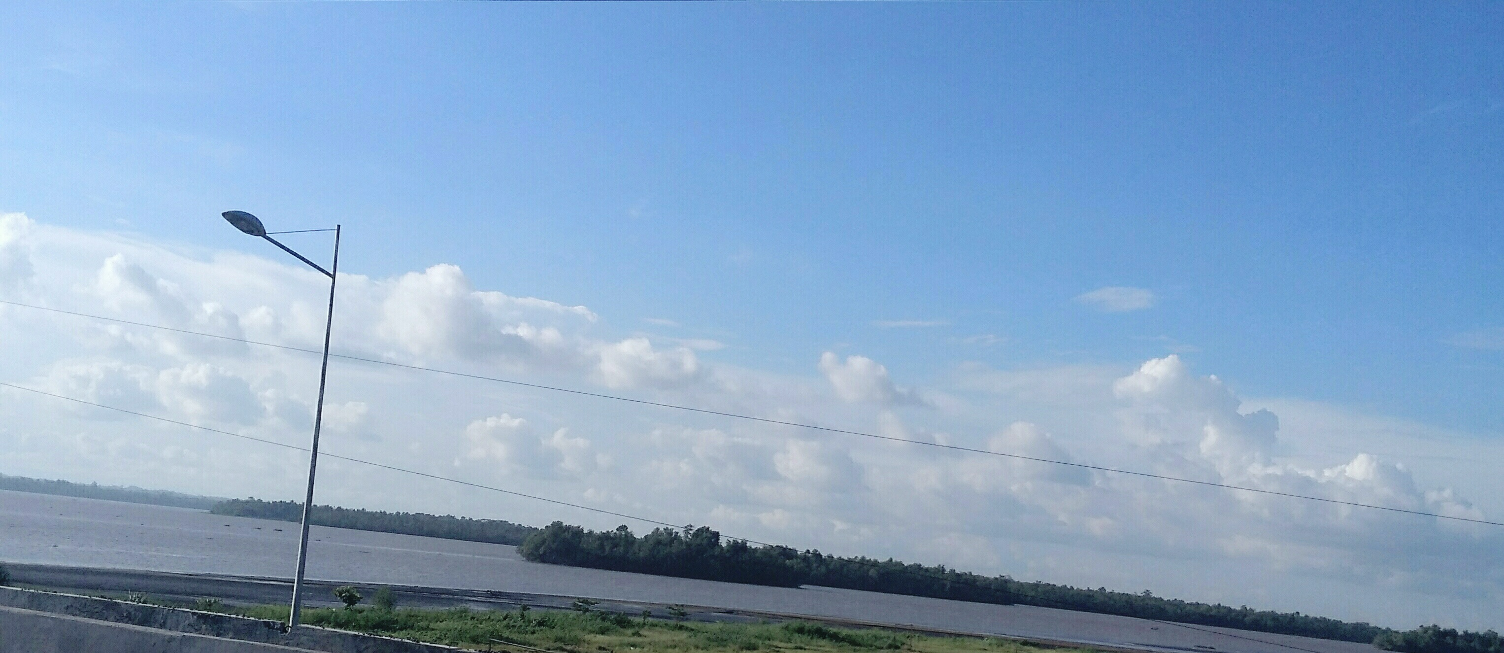 Cette image présente la mangrove situé au Nouveau pont du Wouri dans la ville Douala , région du Littoral.